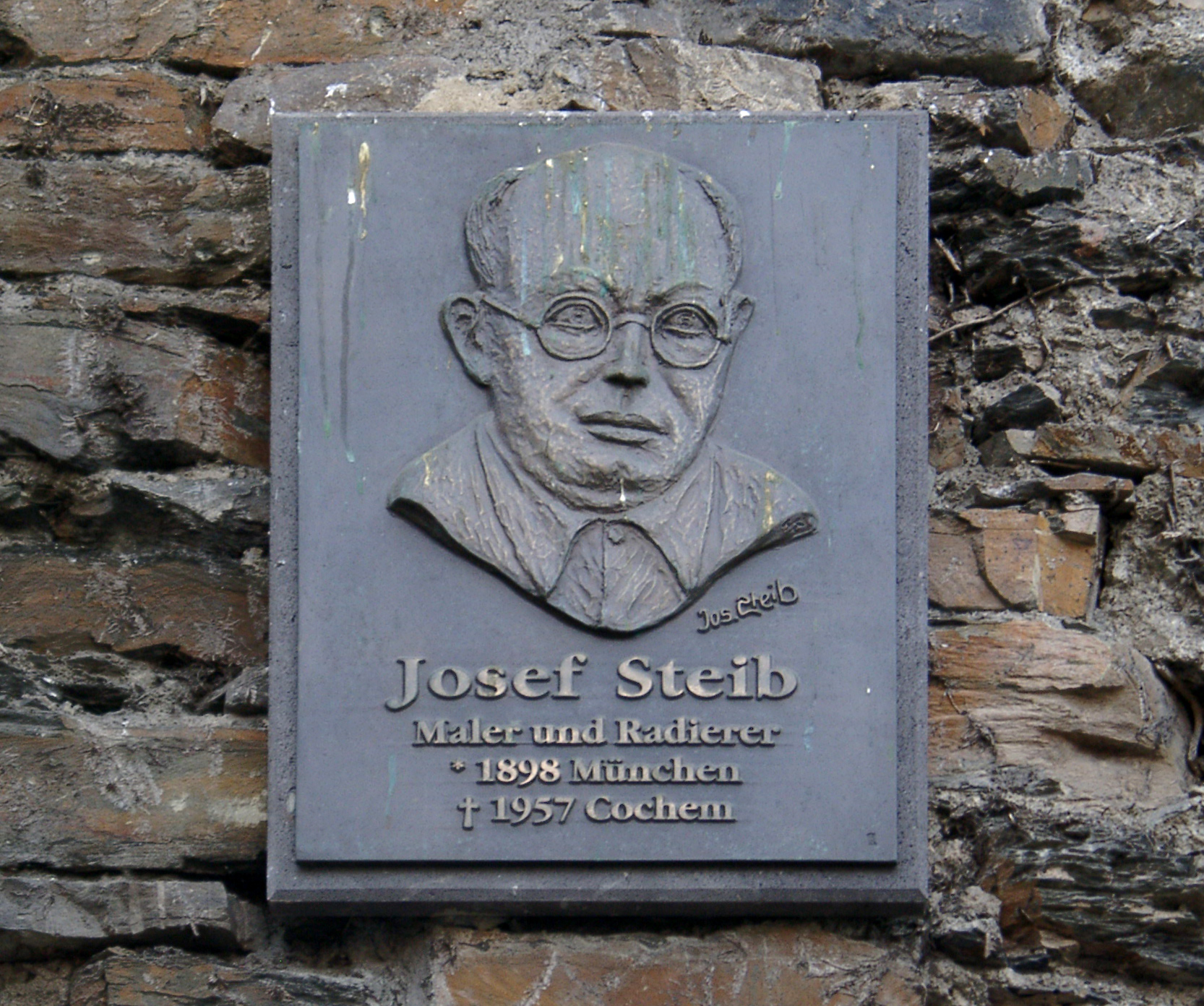 Gedenktafel für Josef Steib am Enderttor in Cochem